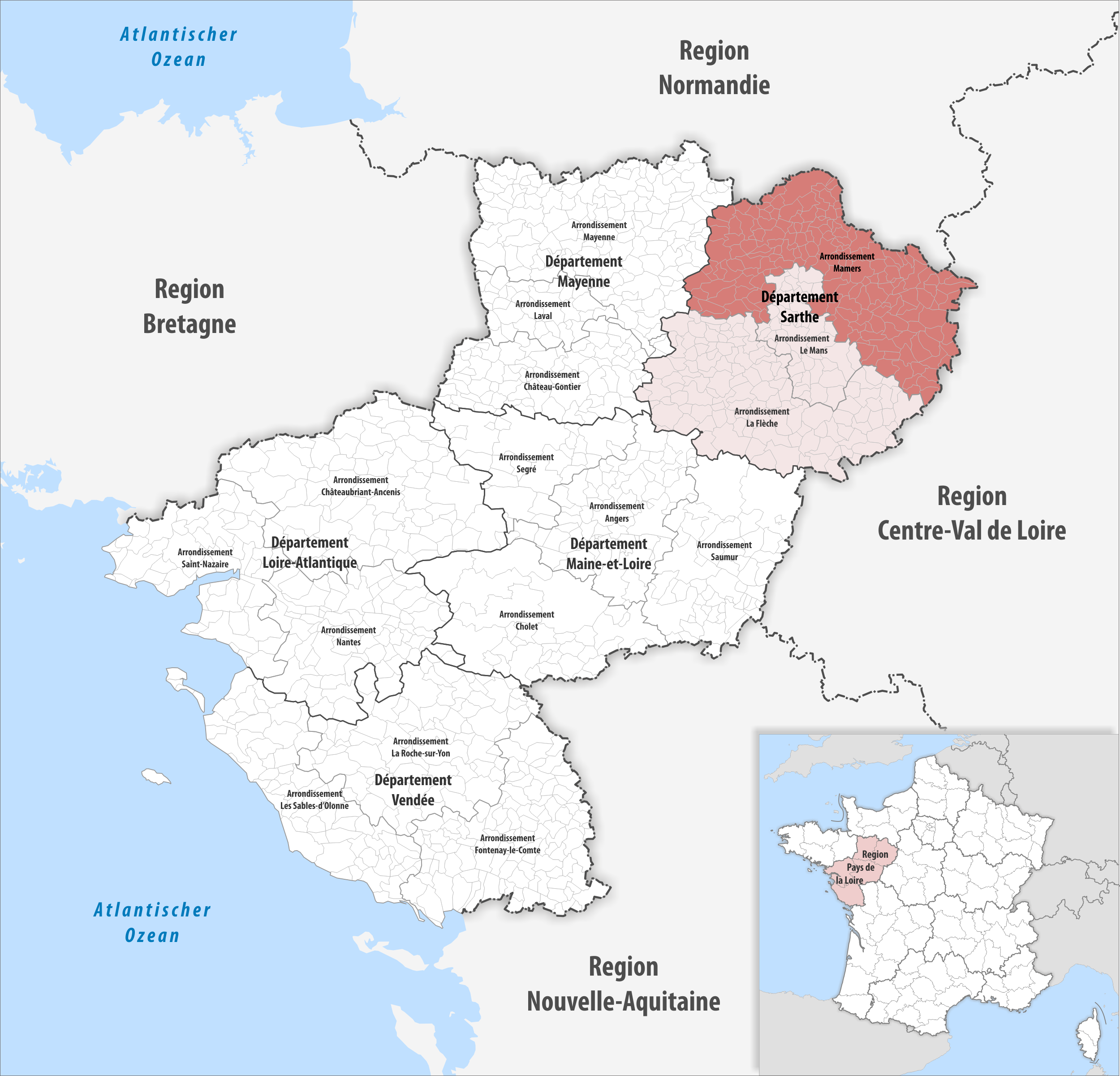 Lage des Arrondissements Mamers